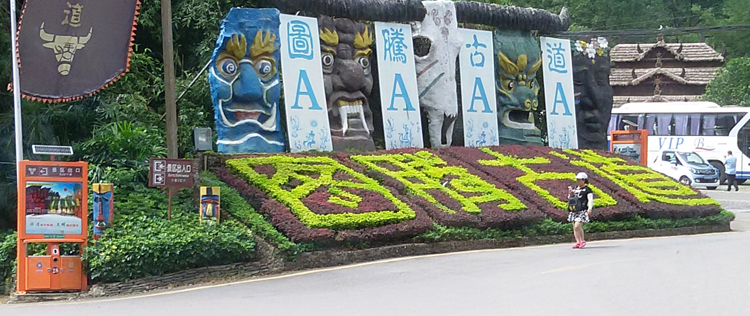 粵語: 阳朔图腾古道